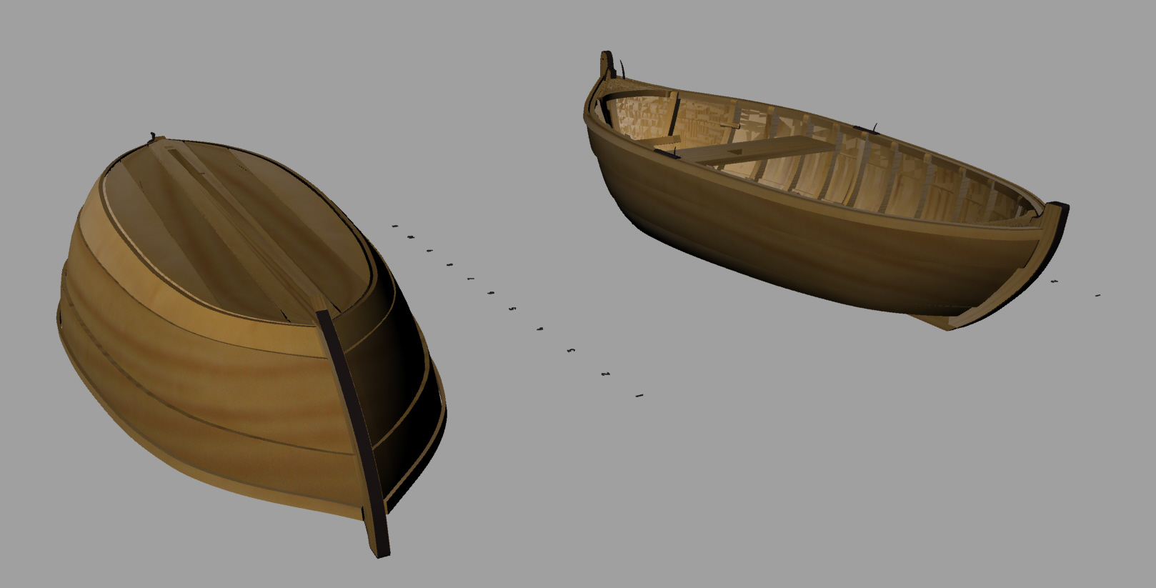 tekening kubboot